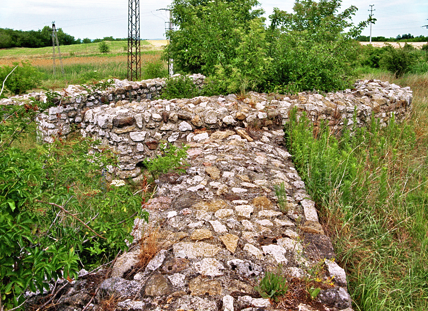 Kastell Tokod - ovaler, hufeisenförmiger Turm in der Ostecke des Lagers. This is a photo of a monument in Hungary, Identifier: 6487